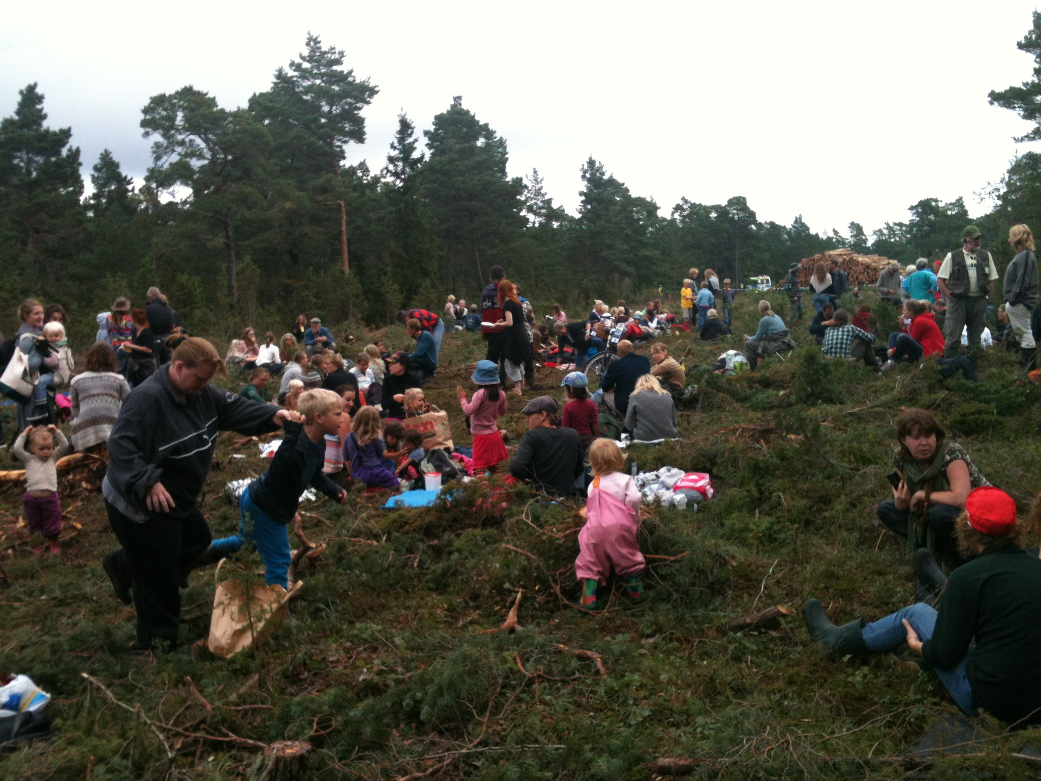 Protester mot avverkning i Ojnareskogen förmiddag lördagen 1 september 2012. I bakgrunden syns en polispiketbuss, men polisen har ännu inte ingripit.